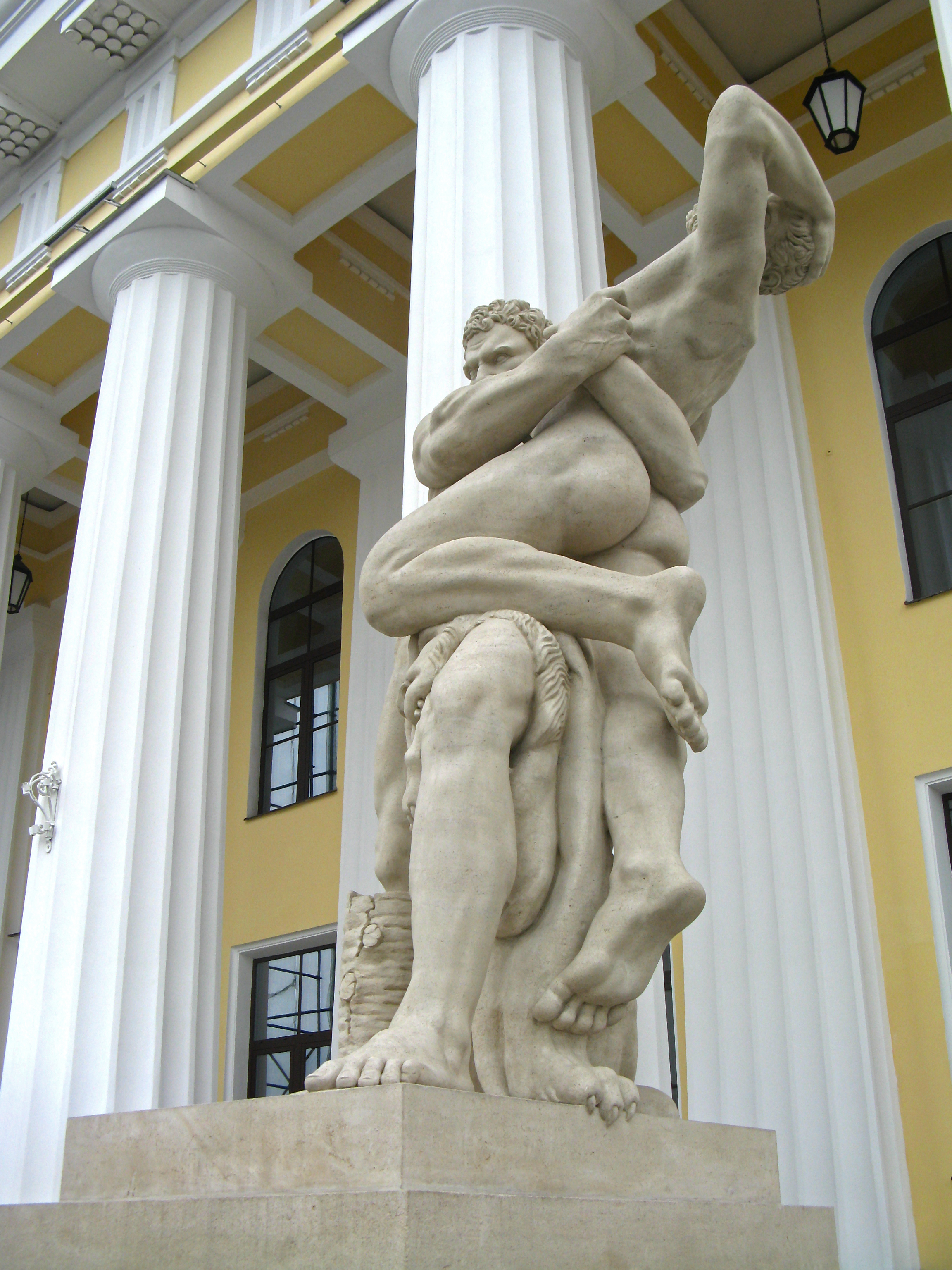 Скульптурная группа 'Геракл и Антей': набережная Лейтенанта Шмидта, 45, 21-я линия Васильевского острова, 2-4, перед портиком главного здания Горного института, Василеостровский район, Санкт-Петербург